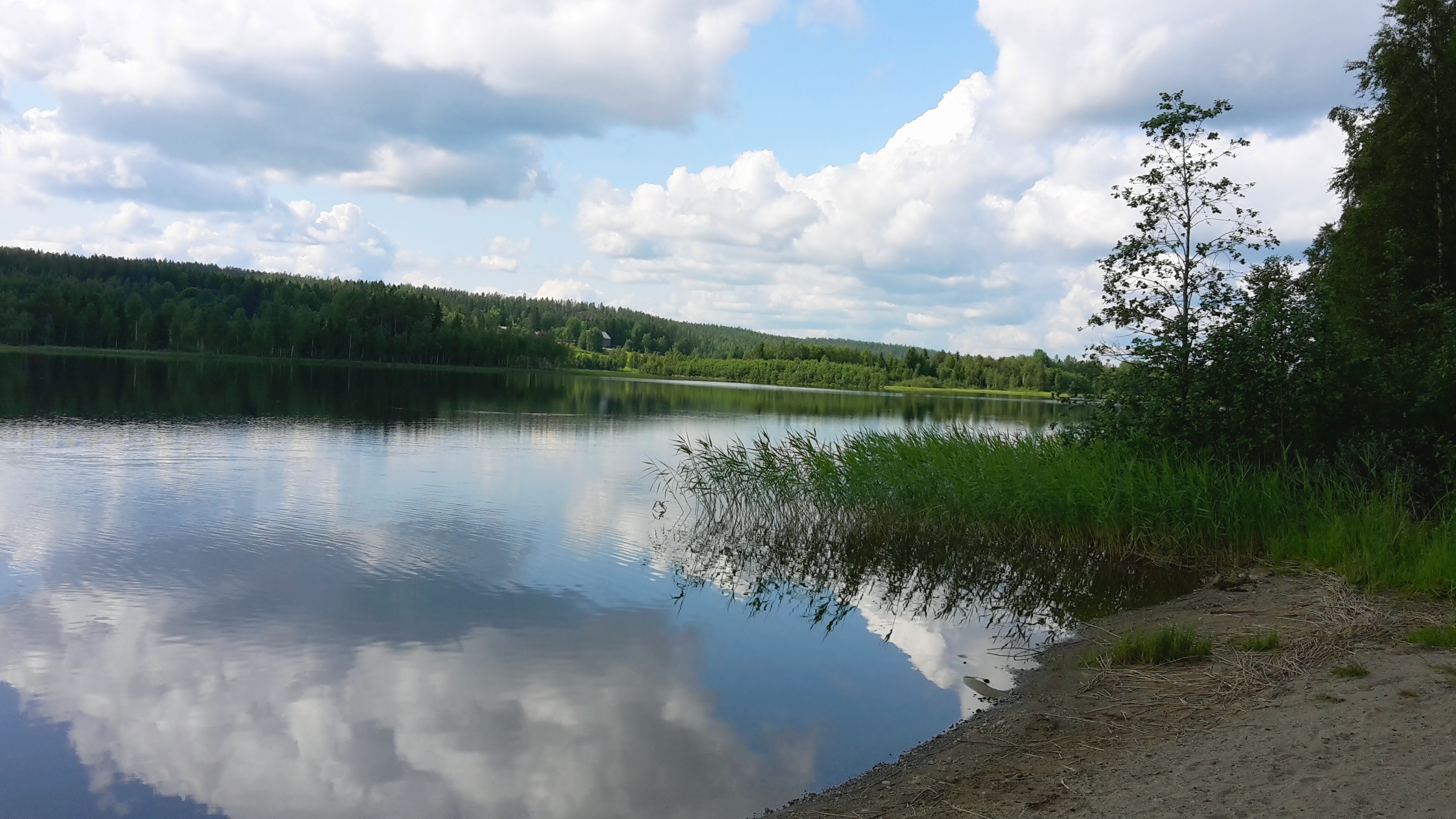 Vy över Orrbölesjön från badstranden på norra sidan.